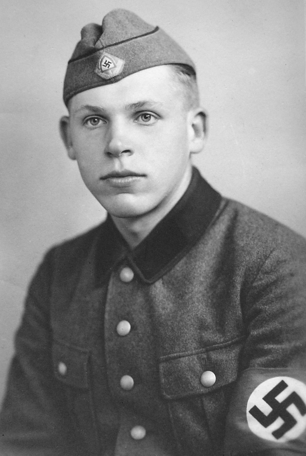 Portrait eines Arbeitsdienstmannes des Arbeitsgaues Ostpreußen